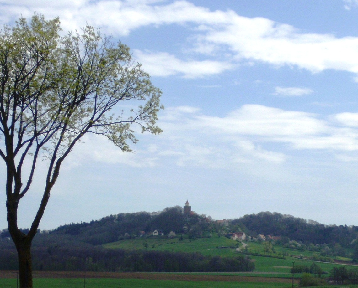 Hohentrüdingen, Ortsteil des Marktes Heidenheim im mittelfränkischen Landkreis Weißenburg-Gunzenhausen